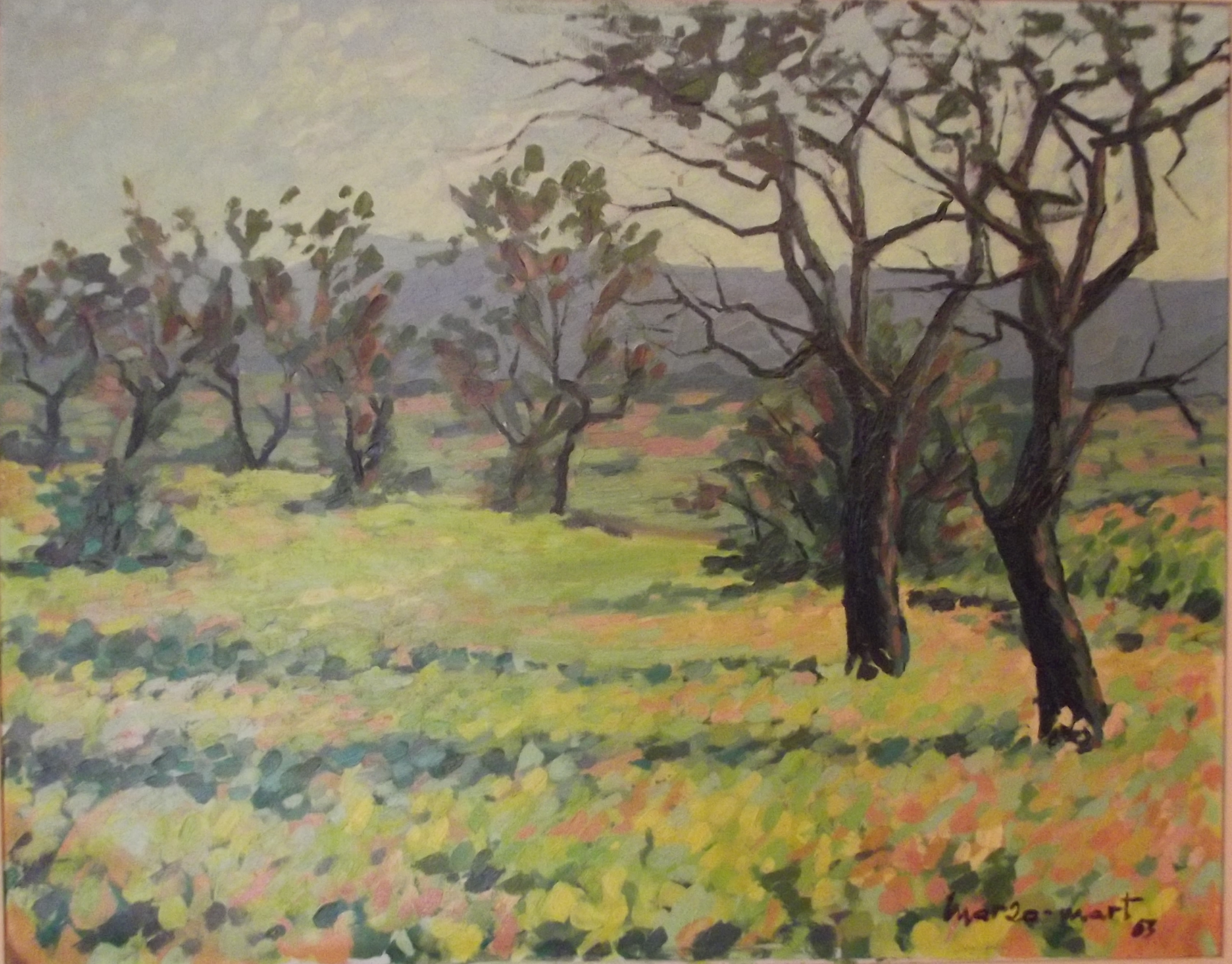 Pintur. Marzo-Mart, 1963